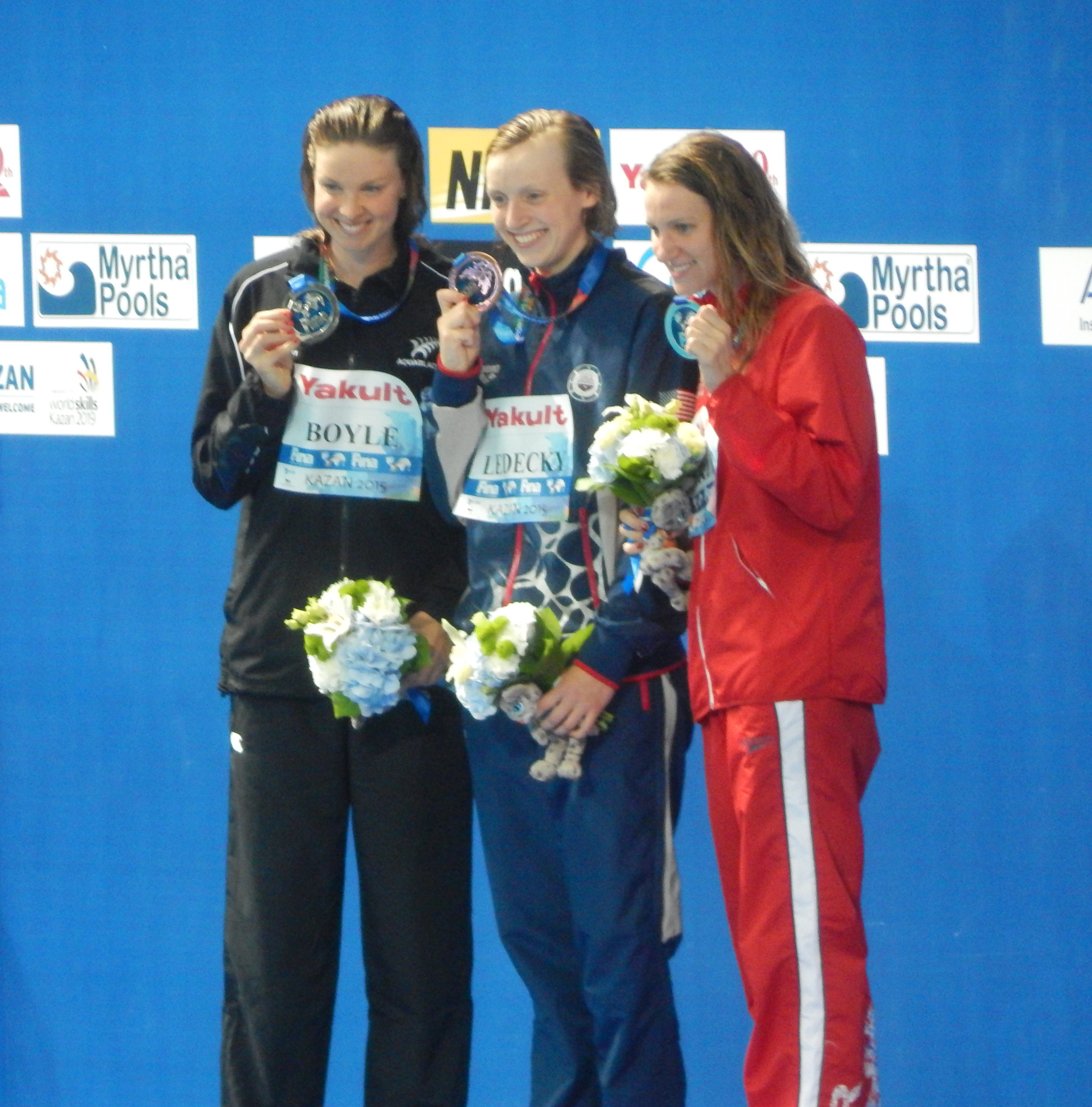 Церемония награждения 800 метров вольным стилем у женщин в Казани